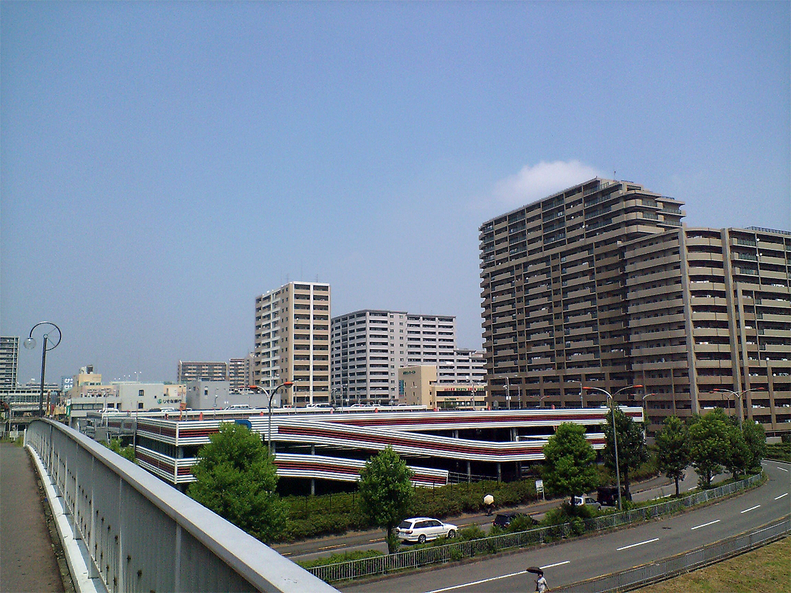 投稿者自身が光明池駅（泉北高速鉄道）周辺のマンション群を撮影。 この写真は、大阪府堺市南区側を撮影したもの。